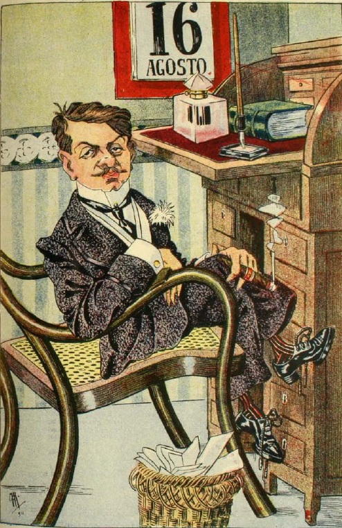 Caricatura de Enrique Zañartu Prieto